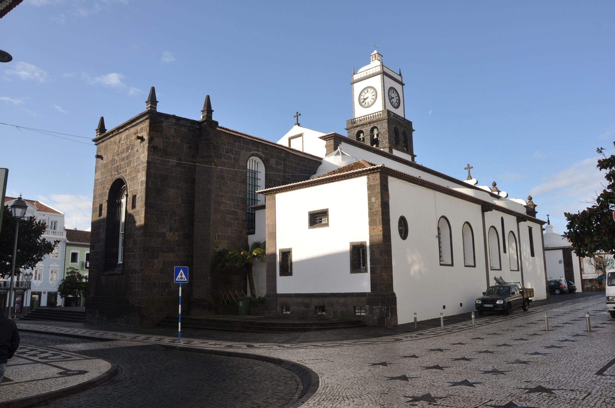 Igreja Matriz de Sao Sebastiao, Ponta Delgada